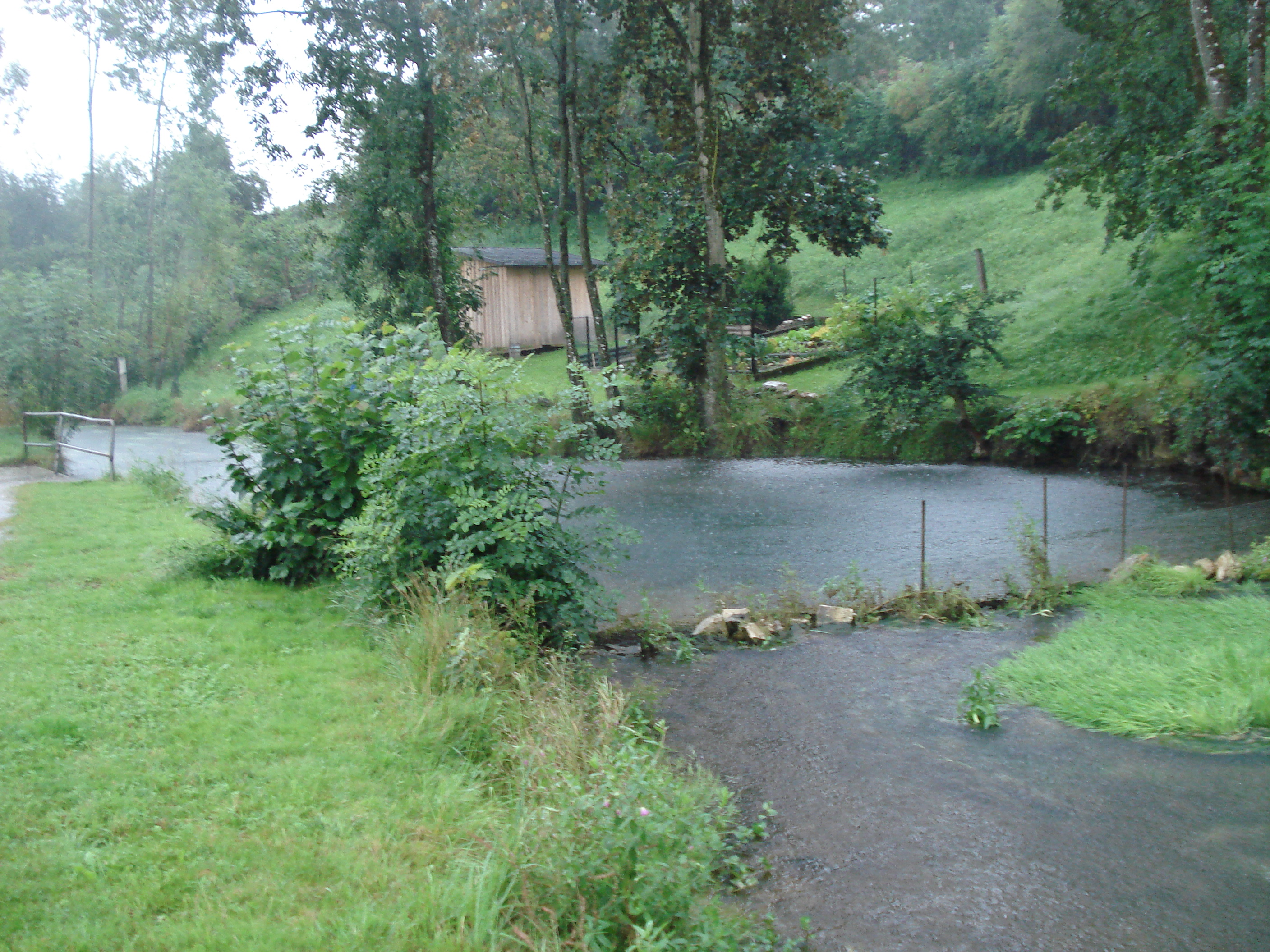 Die Petrusquelle in Deising bei Riedenburg